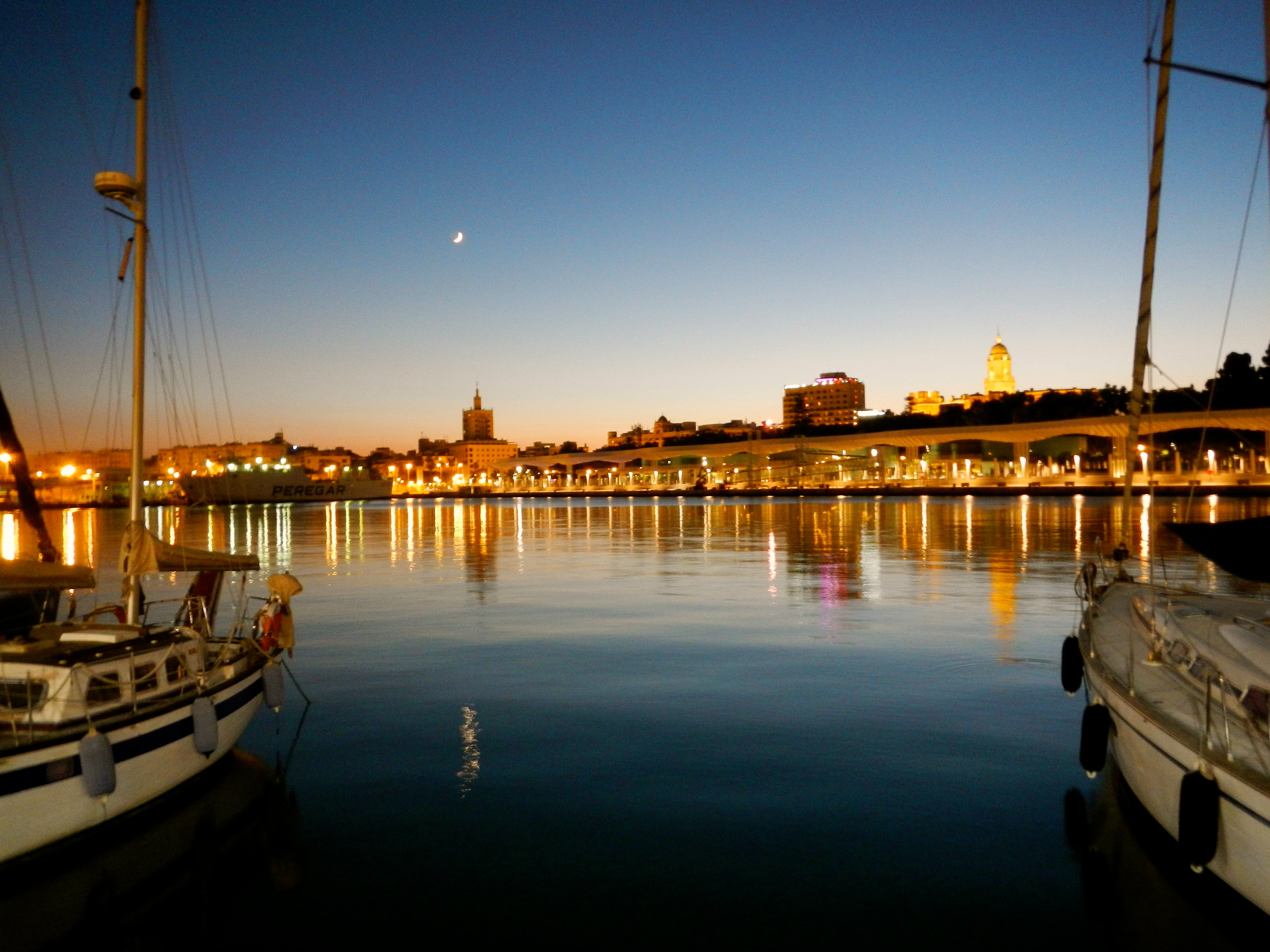 Vista panorámica de Malaga, al atardecer, desde el Muelle Uno. La Catedral de fondo y demás edificios emblemáticos con la luna sobre la escena.